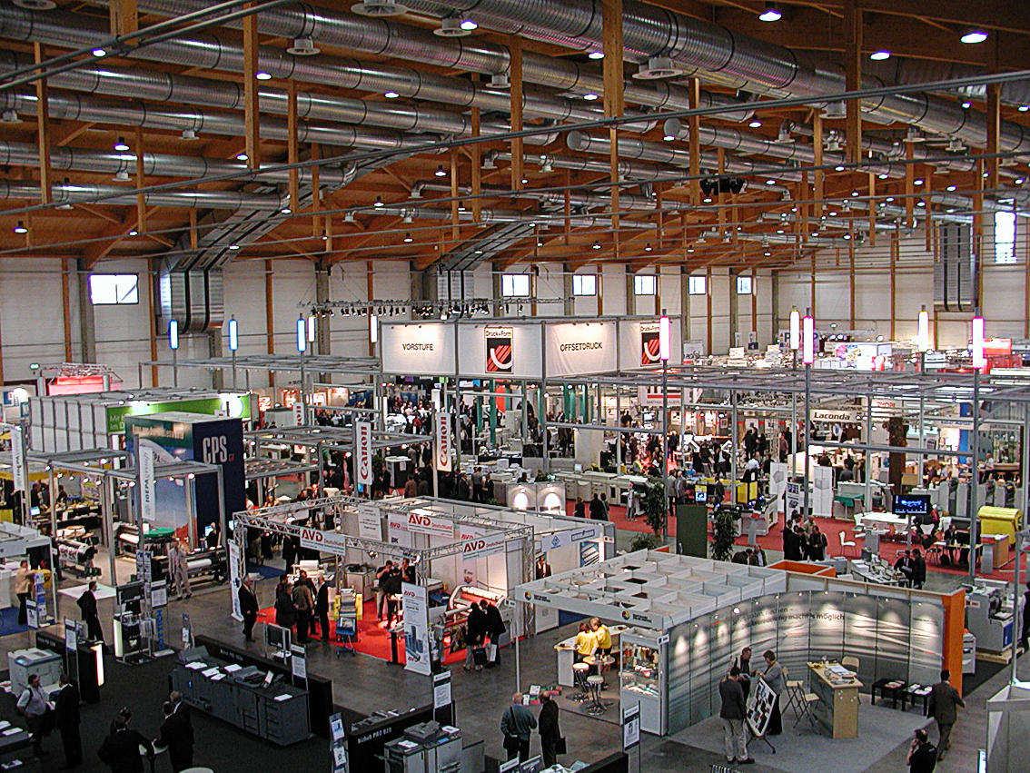 die Halle der Messe Druck & Form in Sinsheim